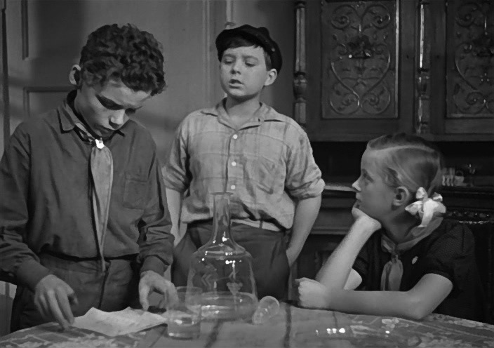 «Подкидыш» — художественный фильм производства киностудии «Мосфильм» 1939 года. Один из самых первых семейных фильмов в Советском Союзе, сценаристами которого стали актриса Рина Зелёная и писательница Агния Барто. Пионеры.